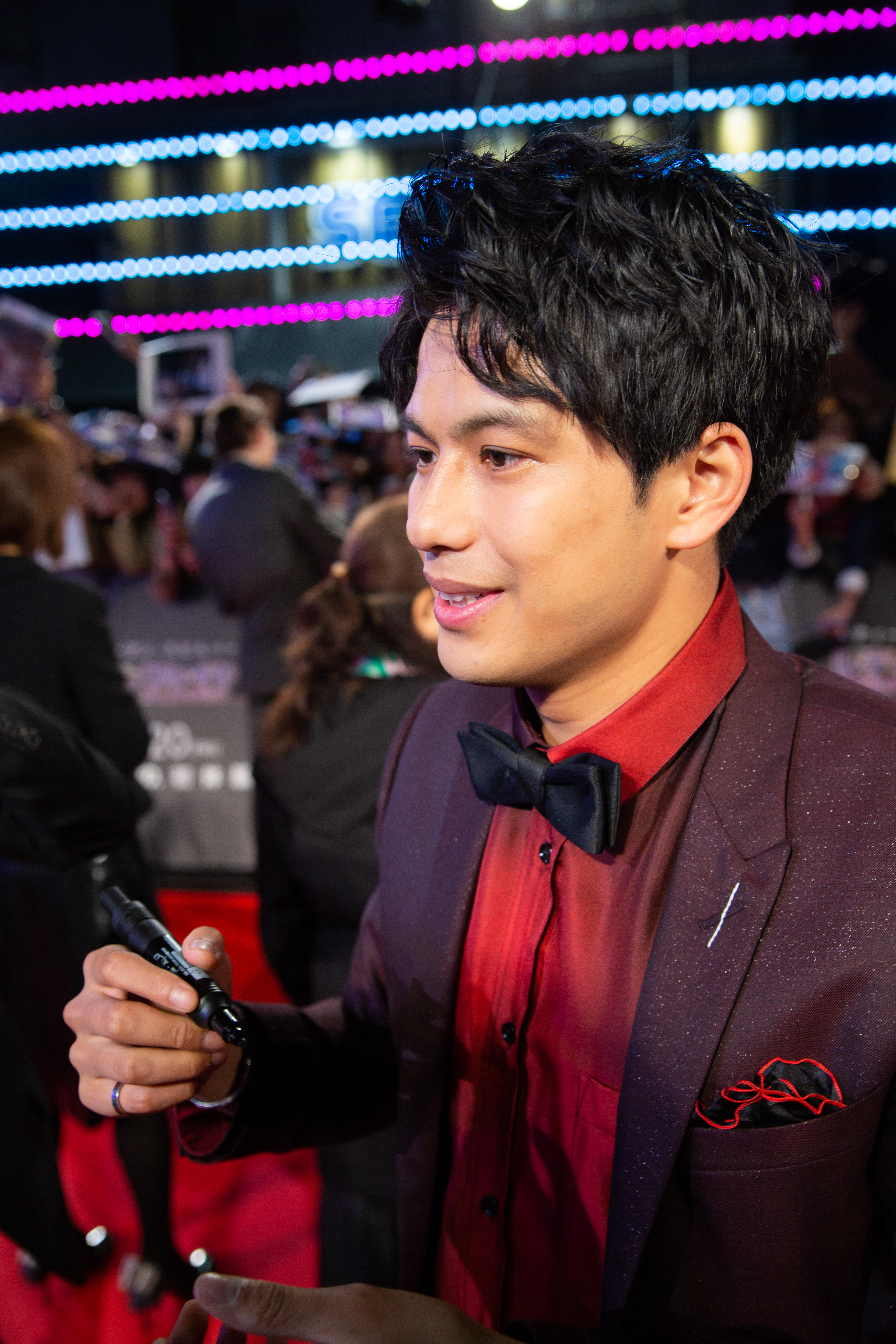 レディ・プレイヤー1 ジャパン・プレミア レッドカーペット 森崎ウィン